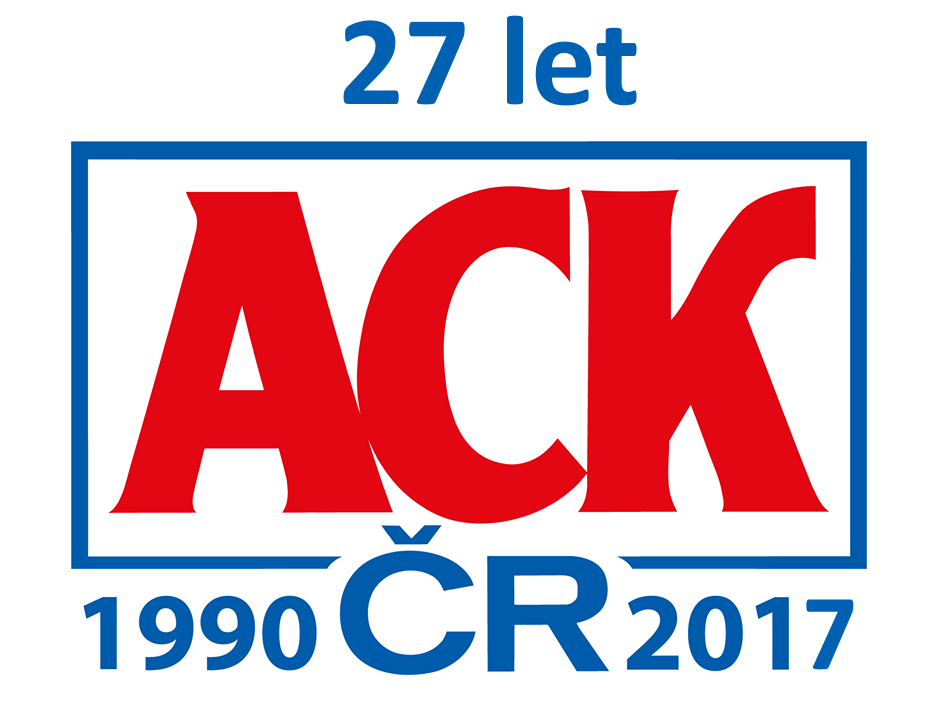 Logo ACK ČR, 27 let